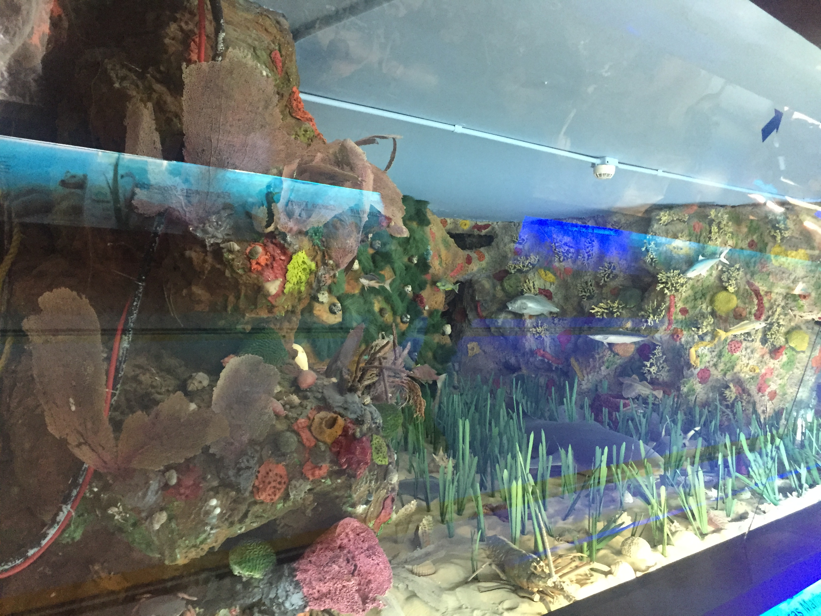 Escenificación de de arrecifes coralinos